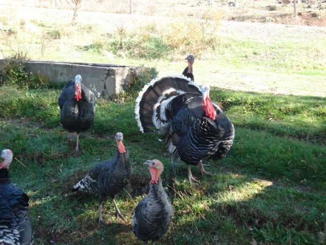 Dosya yükleyen kullanıcıya aittir.